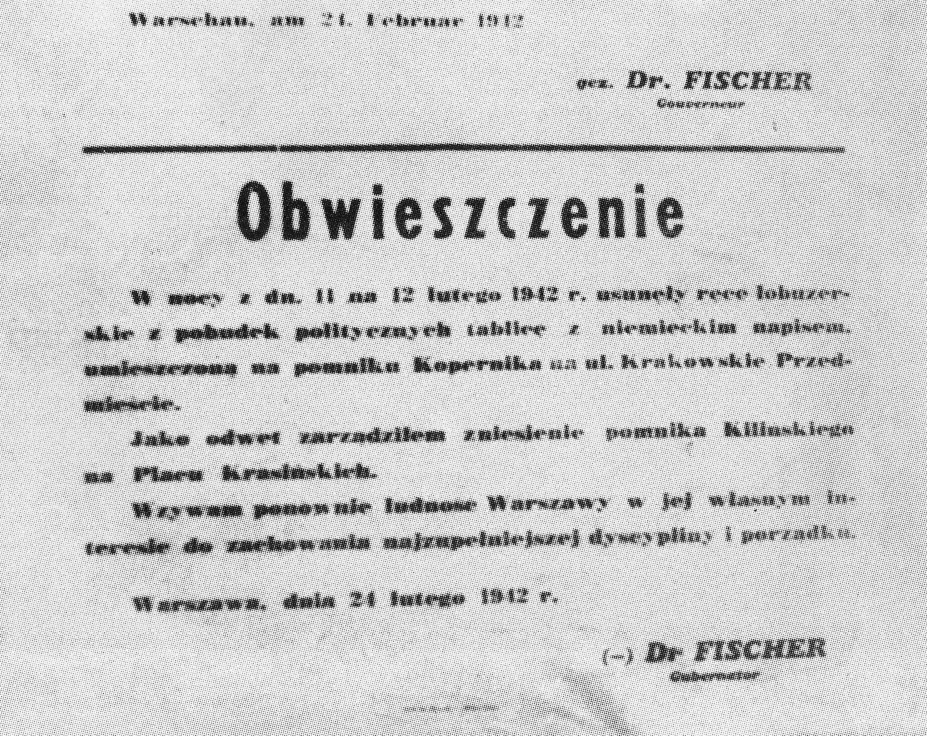 Obwieszczenie (część dolna w j. polskim) gubernatora Ludwiga Fischera o demontażu pomnika Jana Kilińskiego w związku ze zdjęciem niemieckojęcznej tablicy z pomnika Mikołąja Kopernika